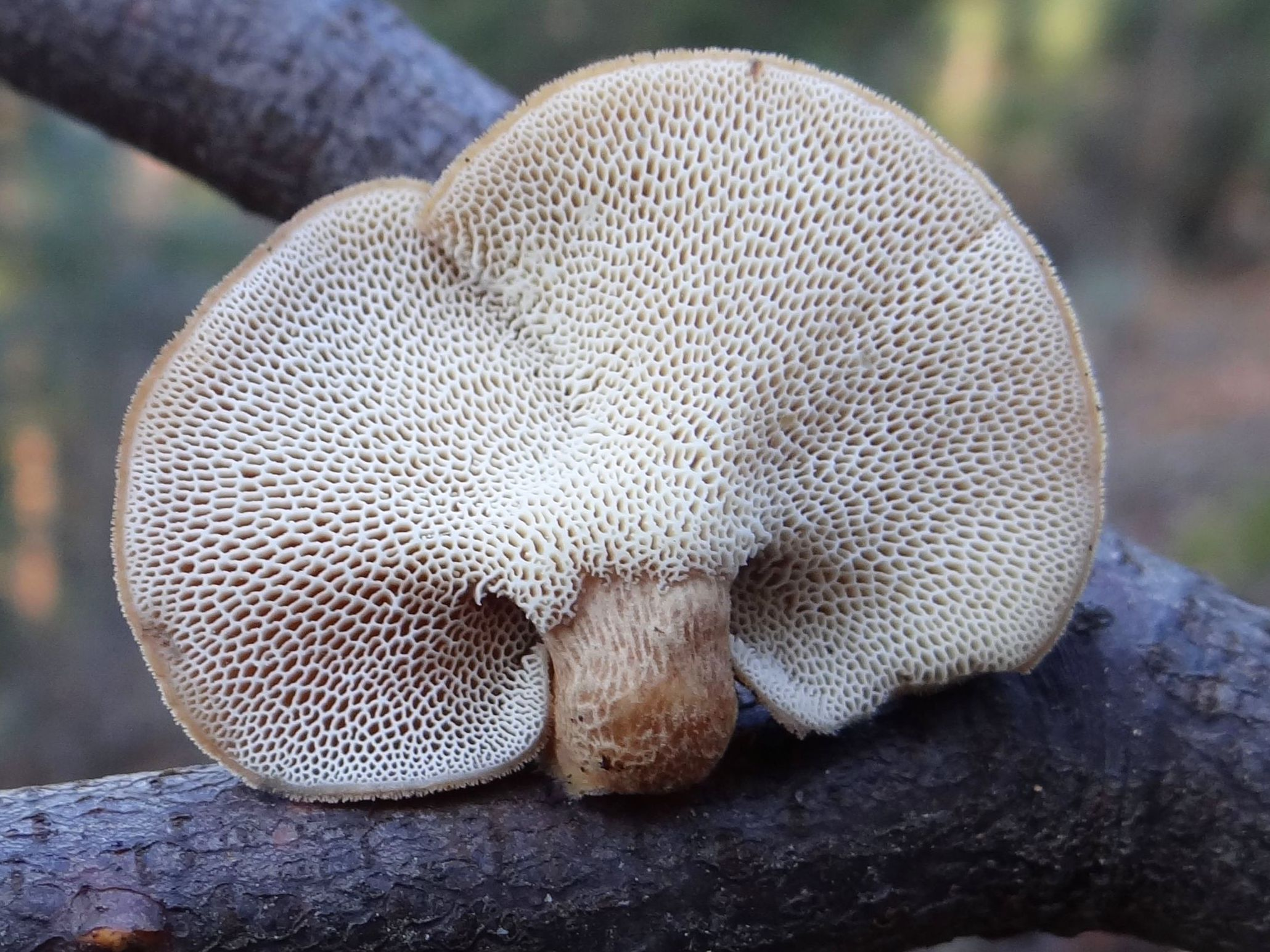 Polyporus brumalis